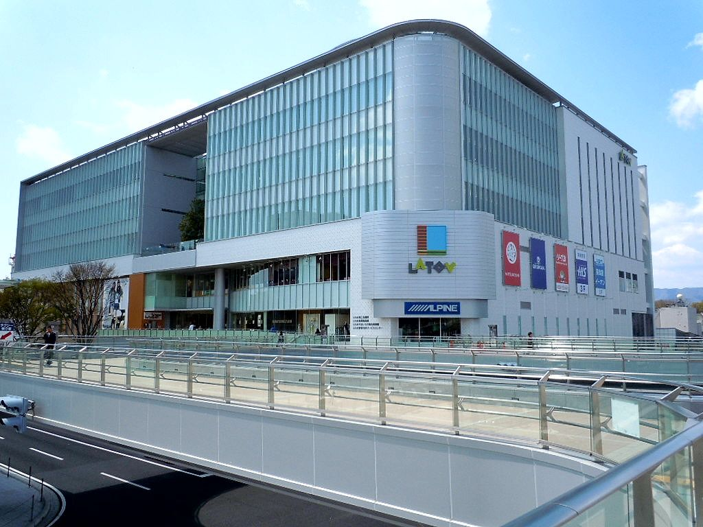 ラトブ（いわき総合図書館、いわき駅前市民サービスセンター、いわき商工会議所本部）